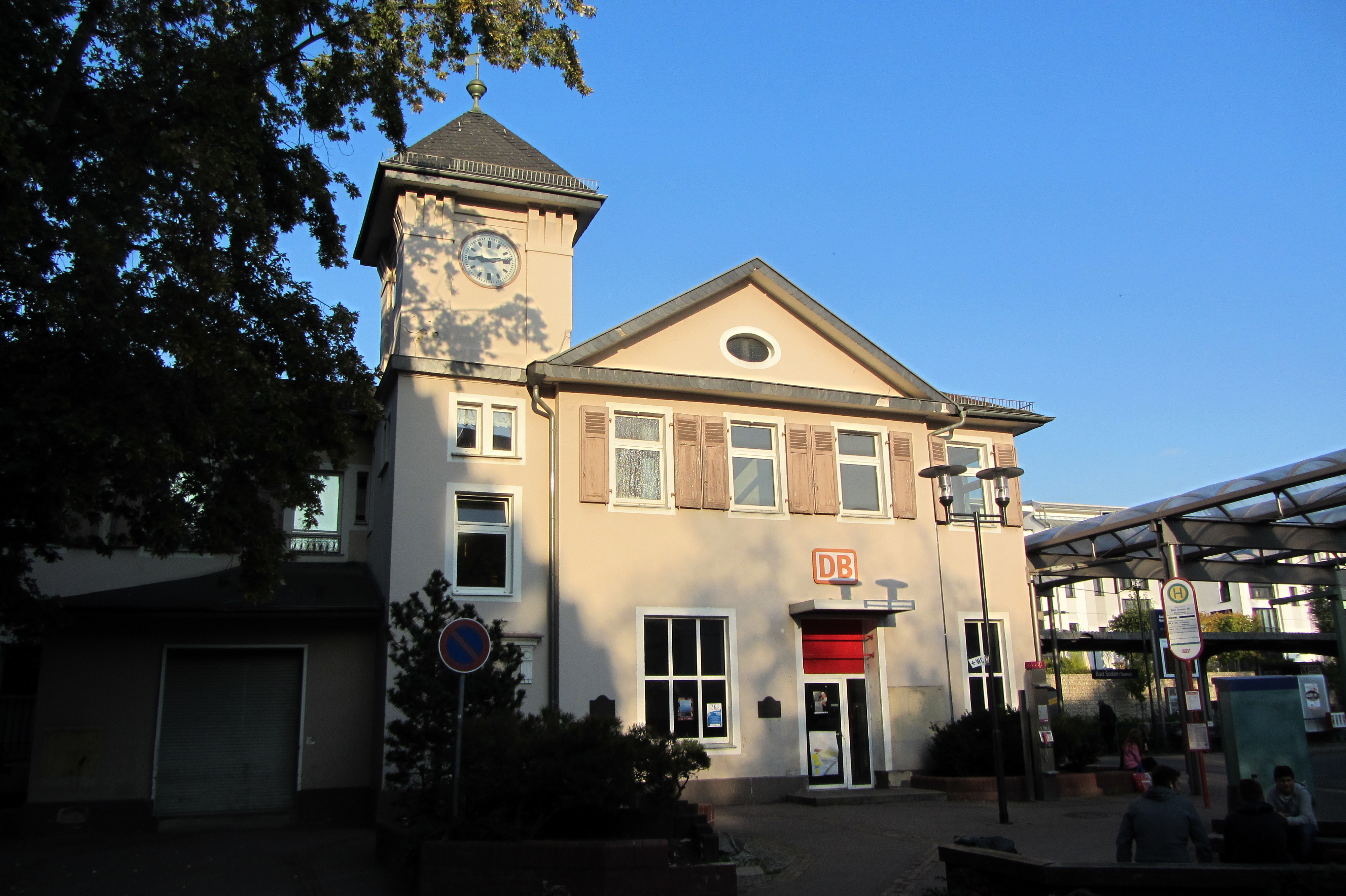 Der Bahnhof in Bad Soden am Taunus